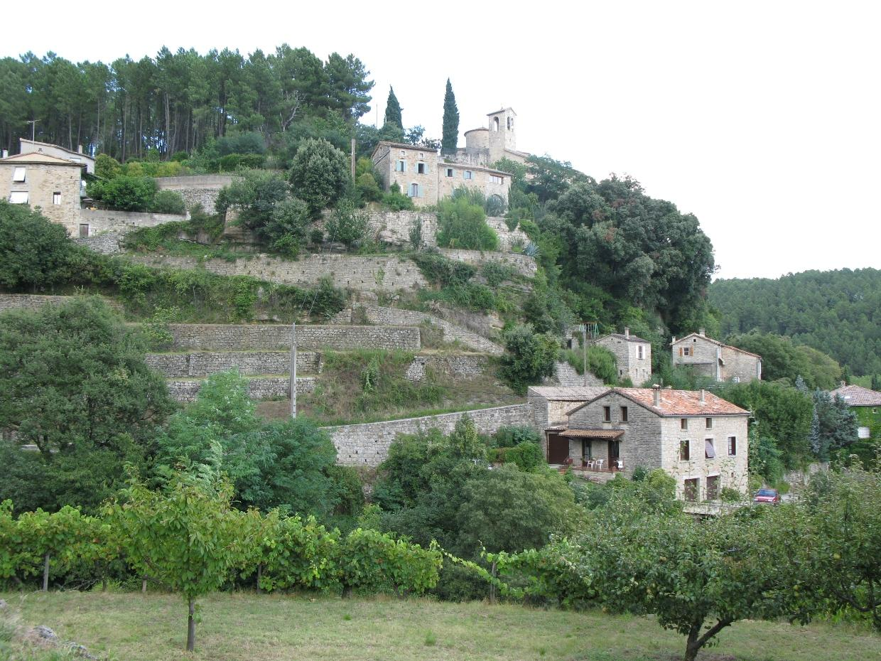 Village de Vernon (Ardèche)